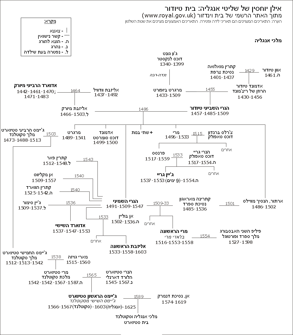 תרגום לעברית של המקור האנגלי (יוצר ) אסף 23:38, 25 יוני 2005 (UTC)